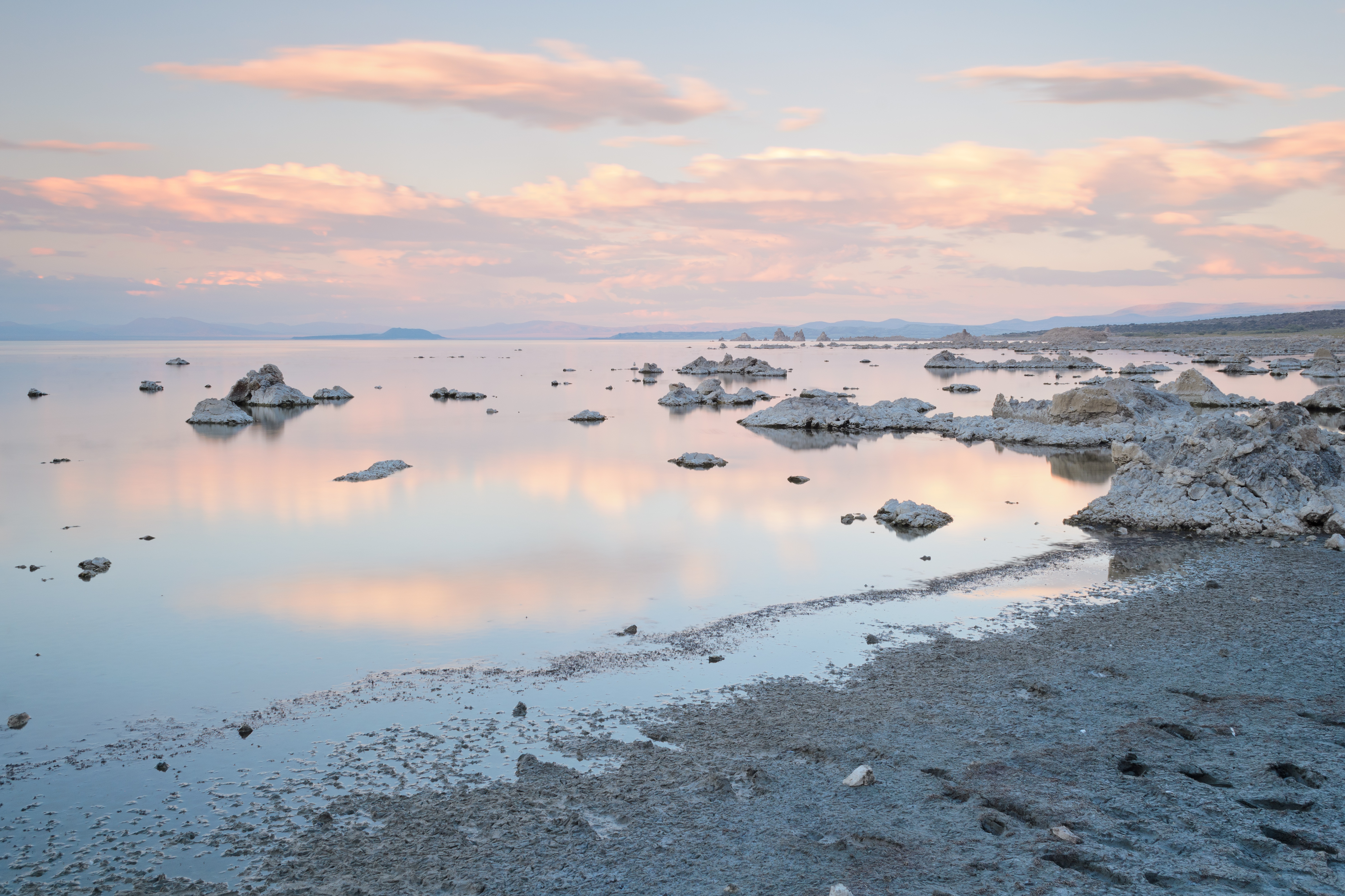 Old Marina, Mono Lake.